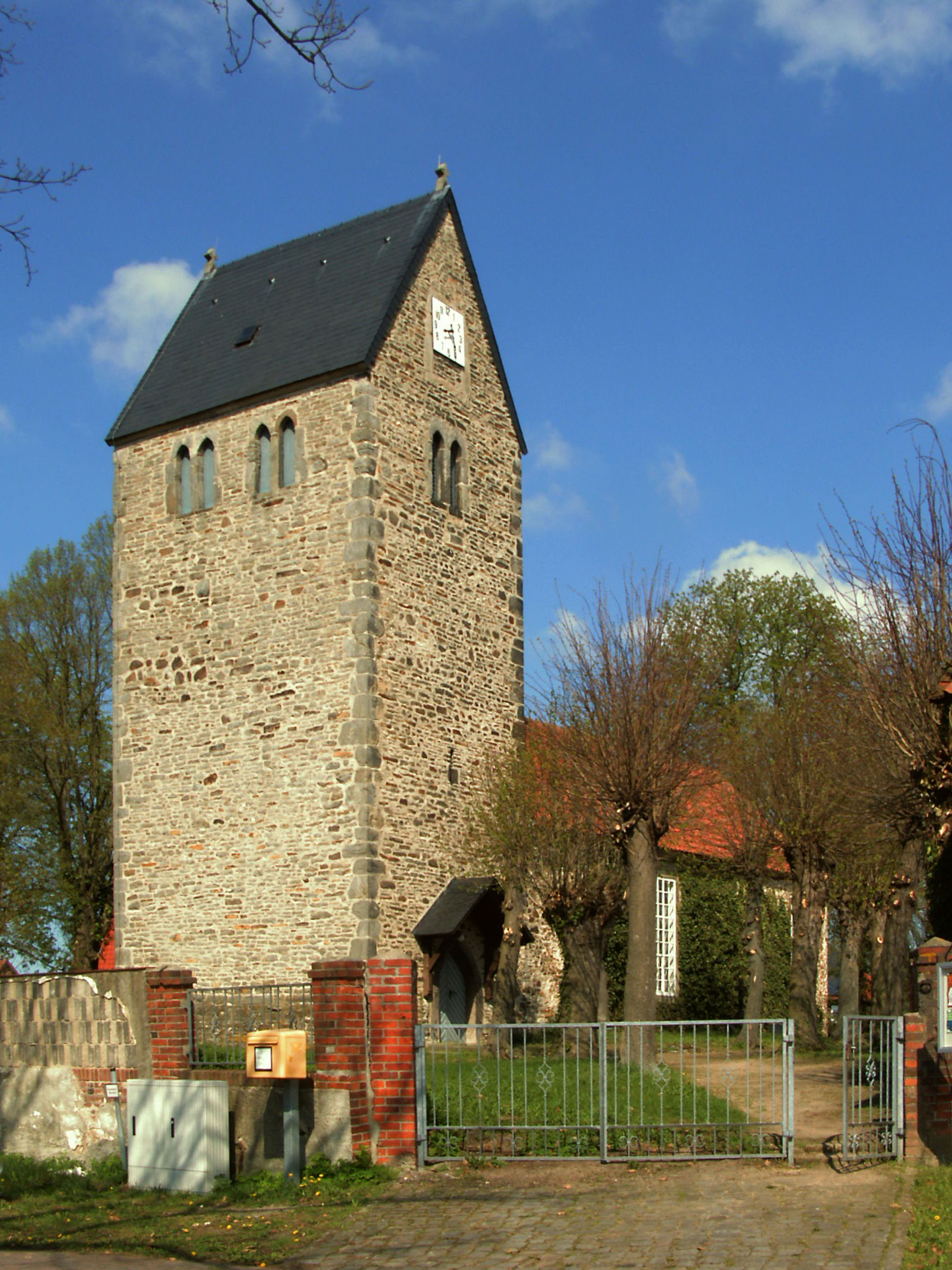 Evangelische Kirche in Gehrendorf (Ortsteil von Oebisfelde-Weferlingen)